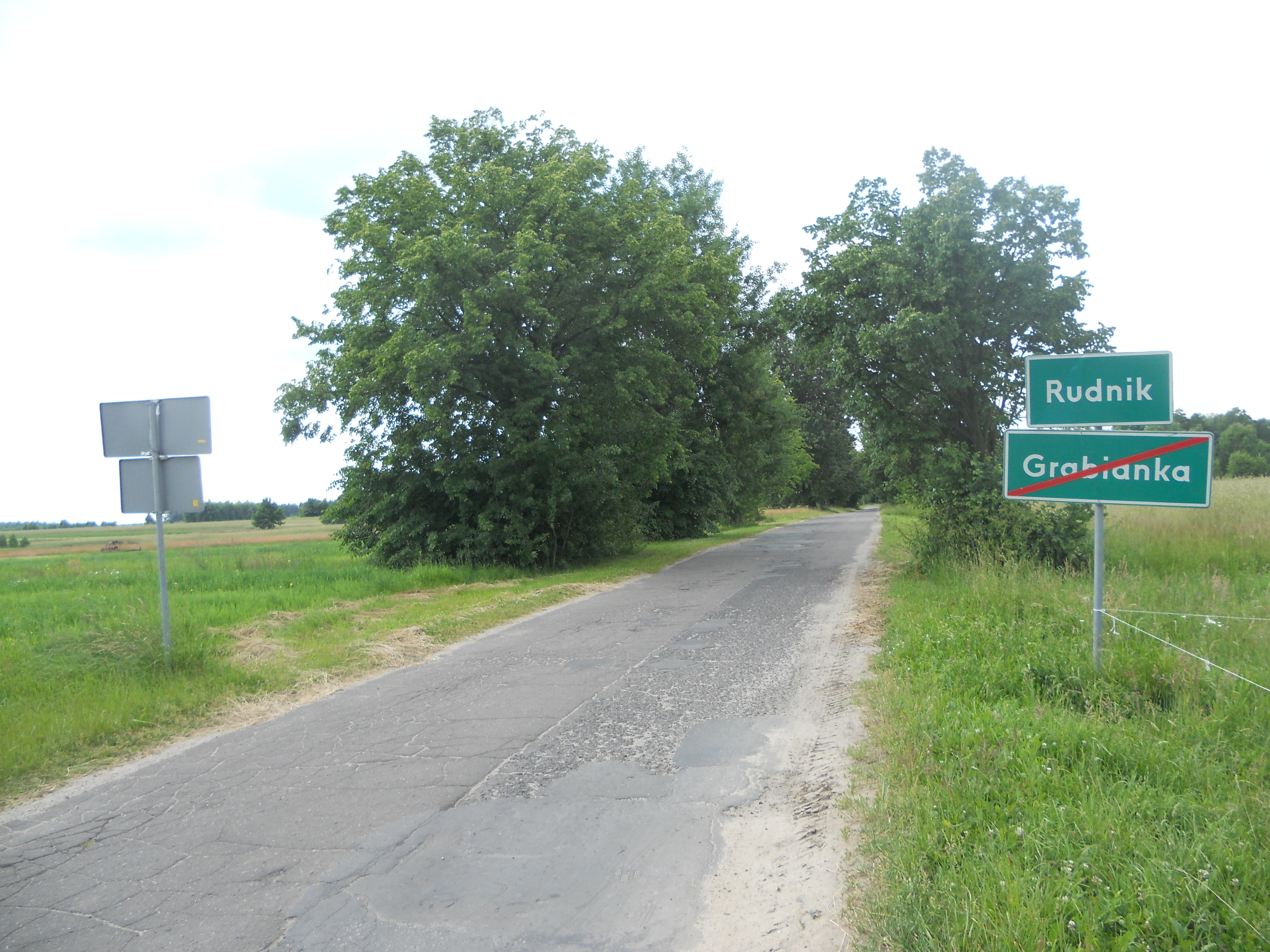 Miejscowość w gminie Osieck